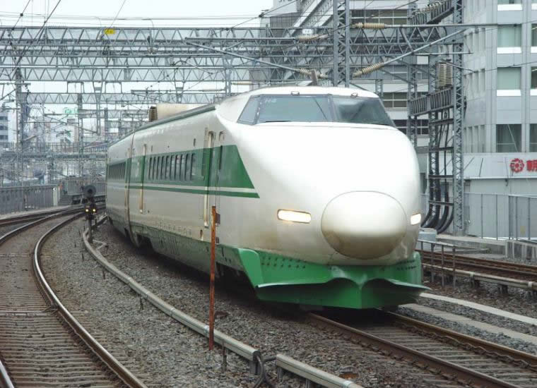 신칸세 200계 H4편성